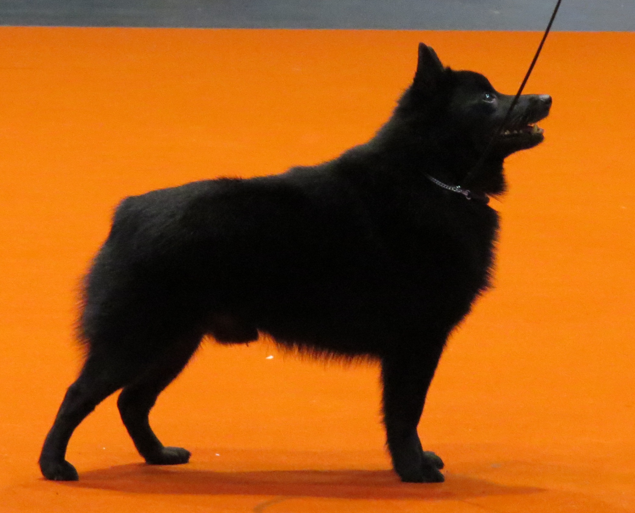 Riga, Baltic Winner 2013, 9-10 Nov